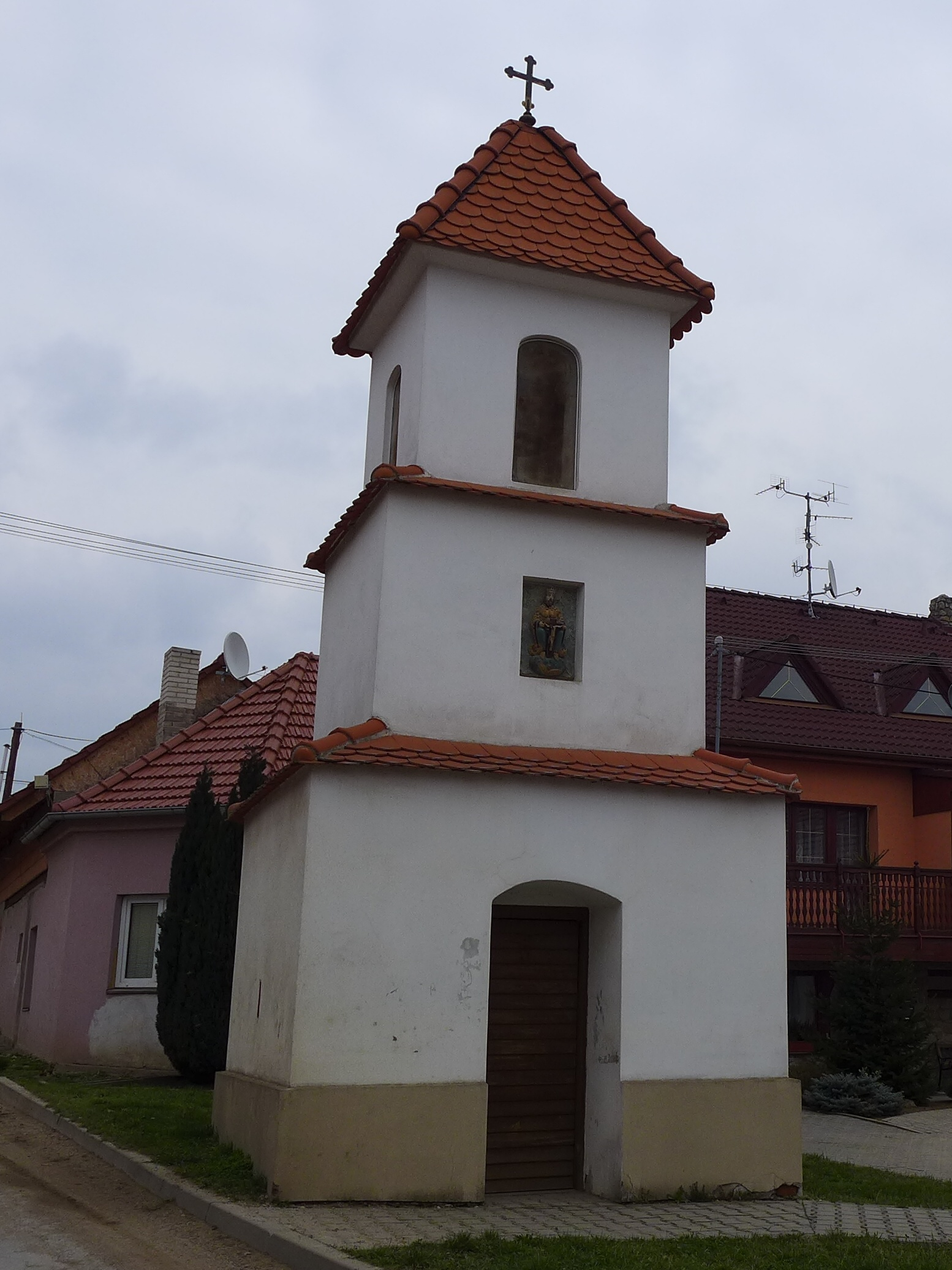 Zvonice, okraj obce, Šumice (okres Brno-venkov).